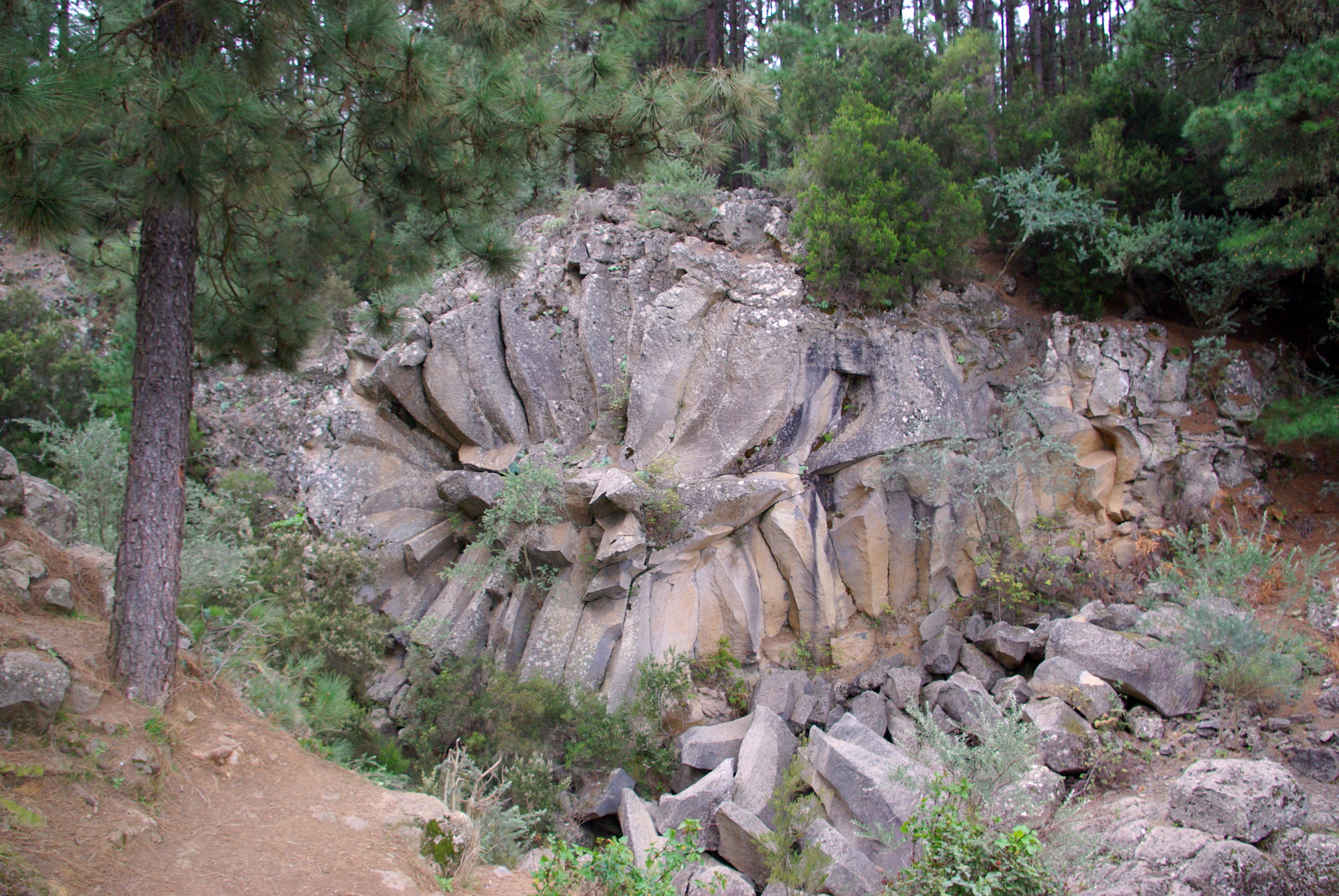 Piedra de la Rosa on Tenerife, Spain